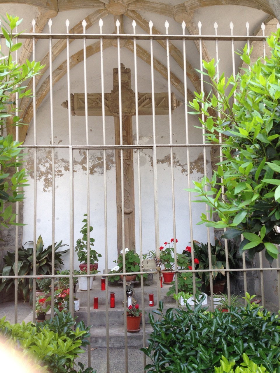 Gurutze Santuaren santutxoa